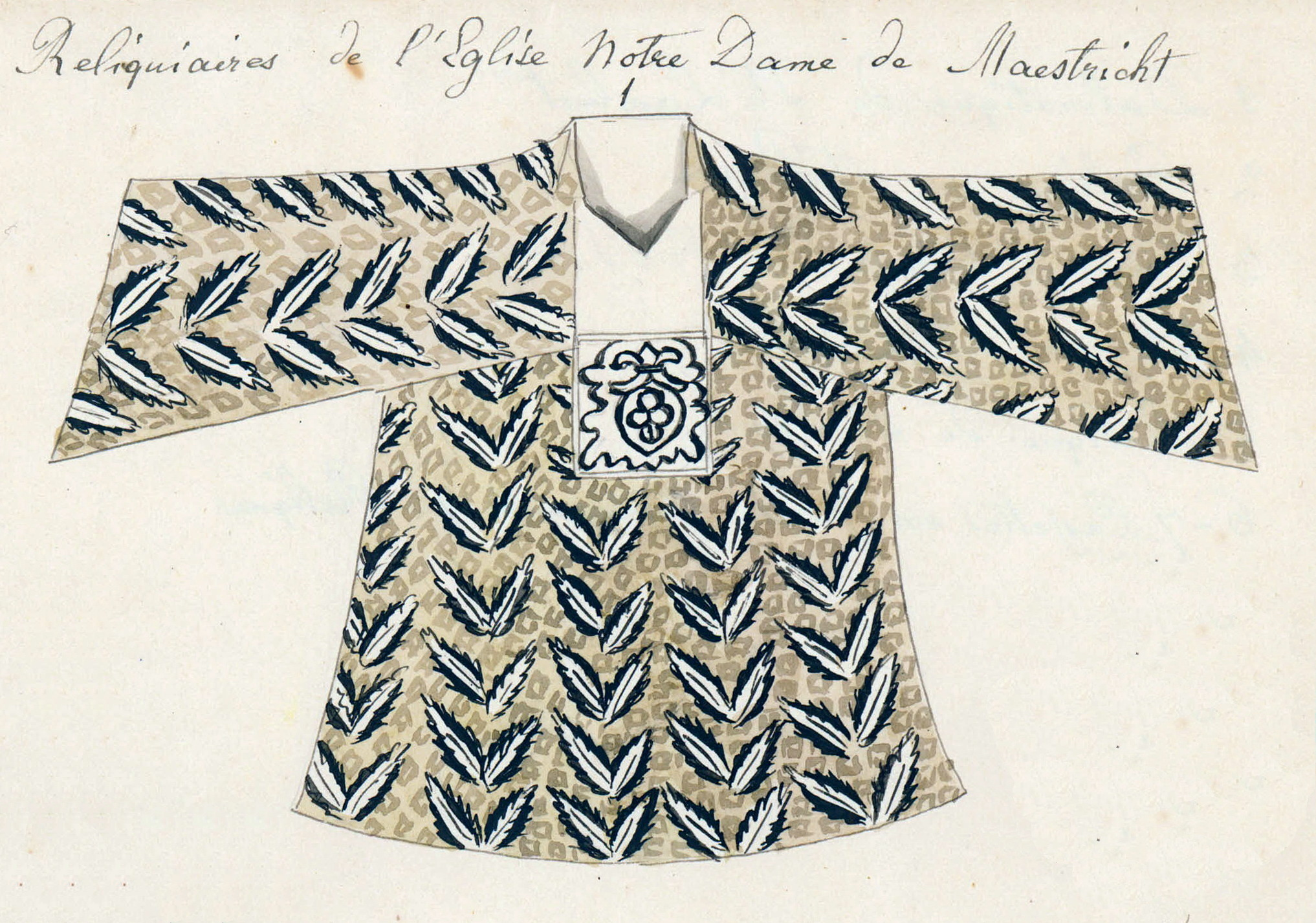 Detail van een tekening van Philippe van Gulpen met het zgn. levietenkleed van Lambertus in de Schatkamer van de Onze-Lieve-Vrouwekerk in Maastricht. Tekst: "Reliquiaires de l’Eglise Notre Dame de Maestricht". Collectie van der Noordaa in het RHCL, Maastricht, CVDN 25.